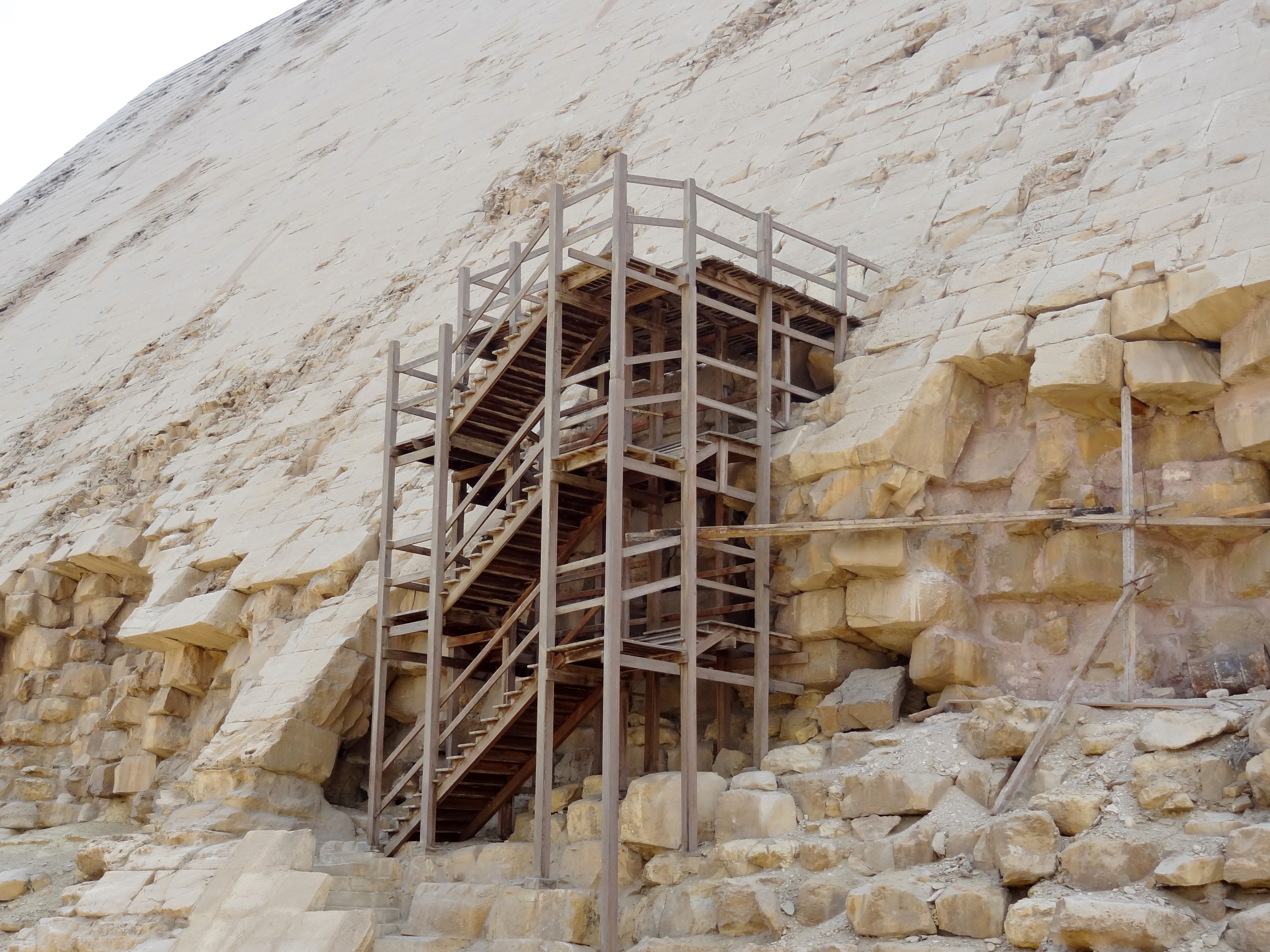 Knickpyramide von Dahschur, Ägypten